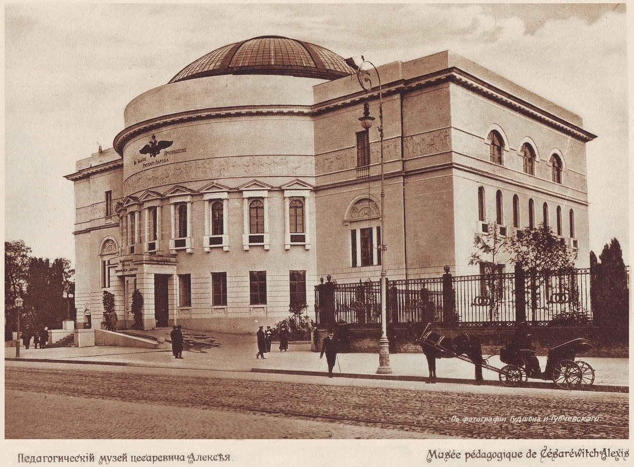 Педагогічний музей Київ 1911